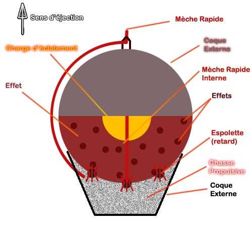 Schema en section verticale d'une bombe de feu d'artifice. Meilleur rendu sur un fond noir !